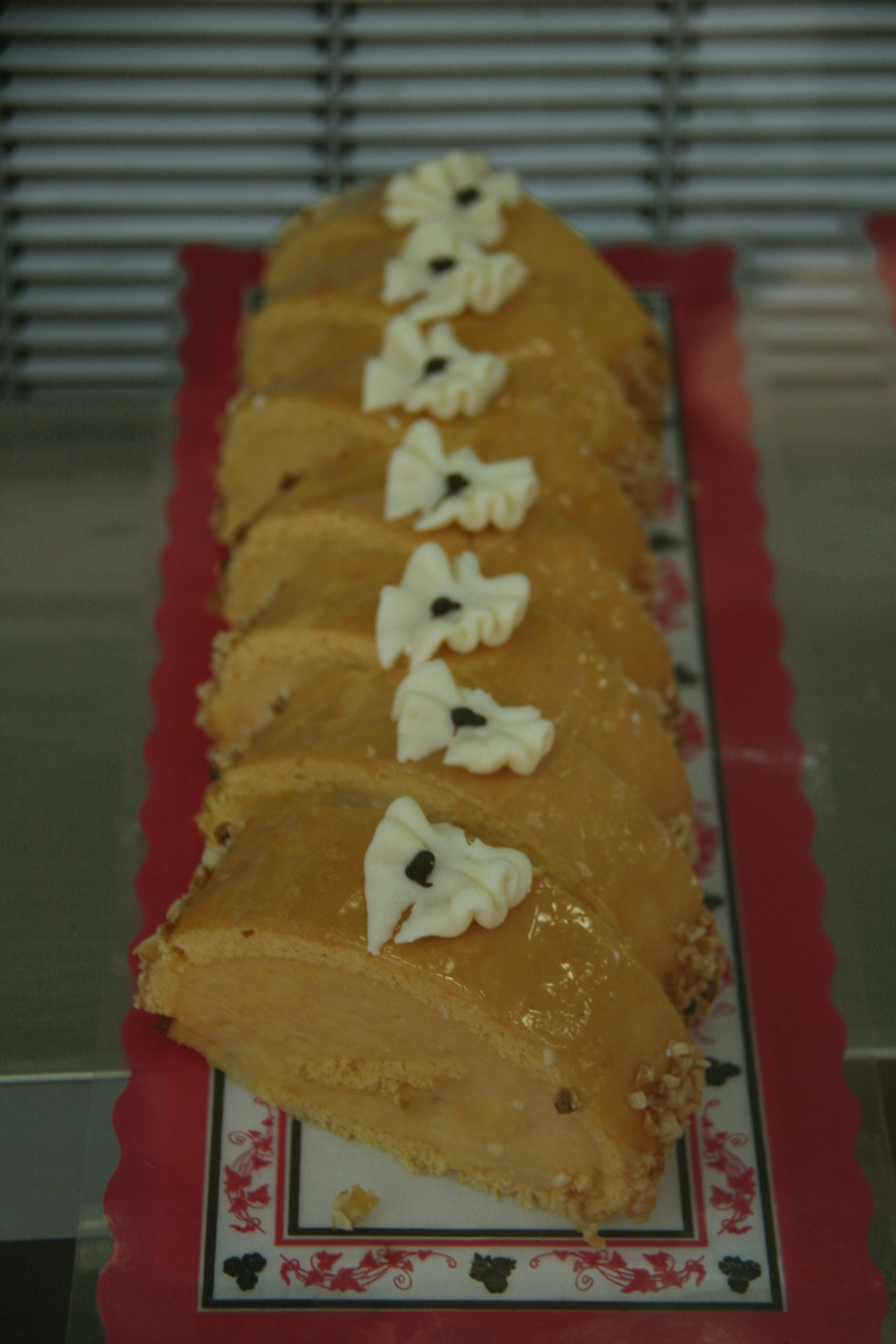 Brazo de gitano